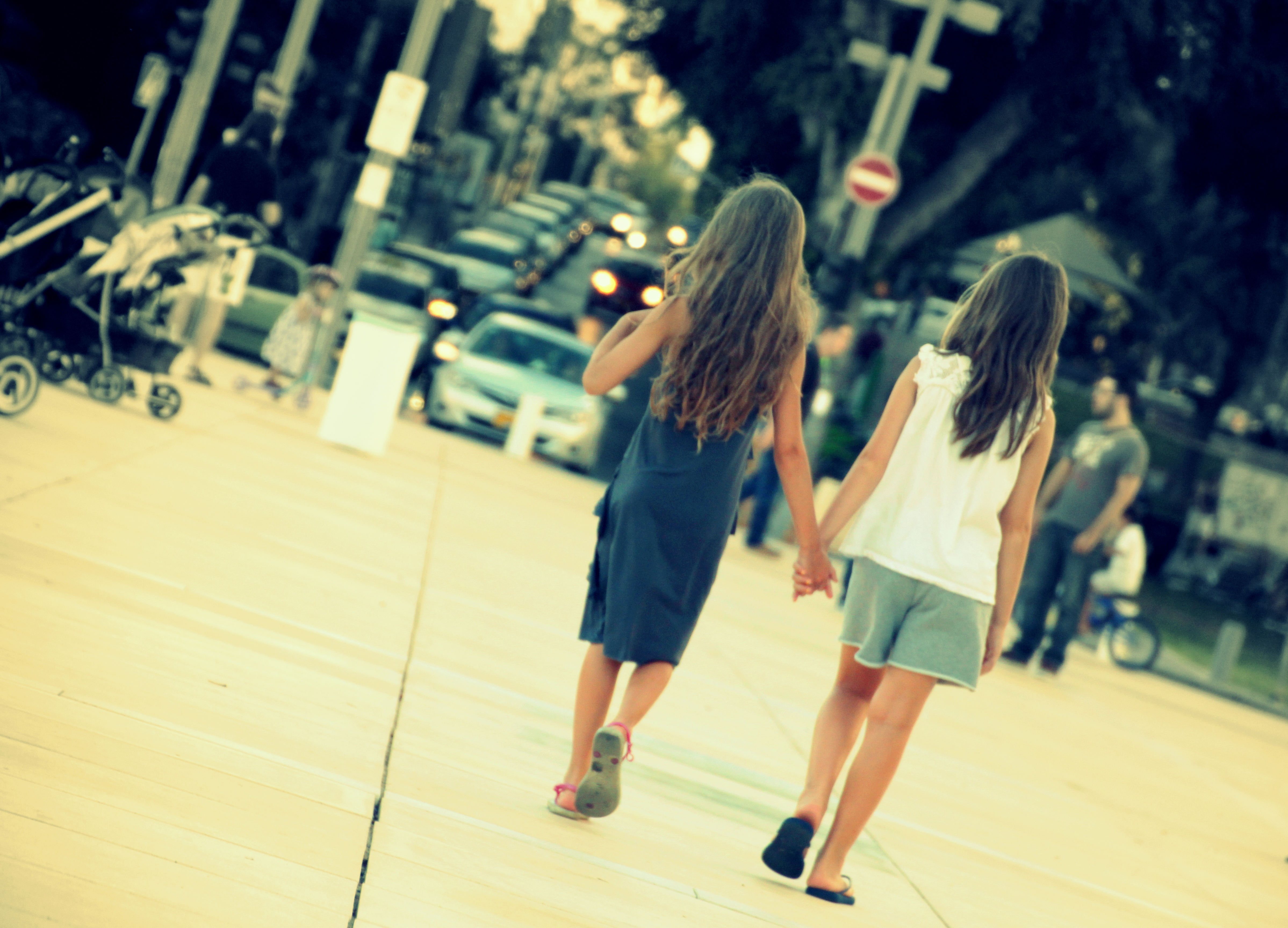 שדרות רוטשילד היו בין ארבעת הרחובות הראשונים של תל אביב (שנקראה אז "אחוזת בית"), שנחנכו לאחר רחוב הרצל (הרחוב הראשון בעיר), ובניצב אליו. הרחובות נסללו על גבי דיונות חול אשר יושרו ושוטחו, ולאורכם נבנו בתיה הראשונים של העיר. התוואי שהפך להיות השדרה היה ואדי קטן שאותו קשה היה ליישר באמצעים של אז, ואליו גם התנקזו מים רבים בחורף. בשל כך הוחלט למלאו בחול להשאירו כשטח פתוח שעליו לא ייבנו בתים אלא בצדיו, כרחוב עירוני רחב יותר. בט"ו בשבט ה'תר"ע (1910) החלו נטיעות בשטח פתוח זה, במטרה להפוך את הרחוב לשדרה הראשונה של העיר. חודשים אחדים לאחר מכן, בדצמבר 1910, החליט ועד אחוזת בית לקרוא לשדרה על שם הברון רוטשילד, ולמנות את מרדכי בן הלל הכהן ואת מאיר דיזנגוף להודיע על כך באופן רשמי לברון. אנשי אחוזת בית ראו בשדרה את תחילתה של שדרה מפוארת כדוגמת הבולווארים המפוארים של פריז.